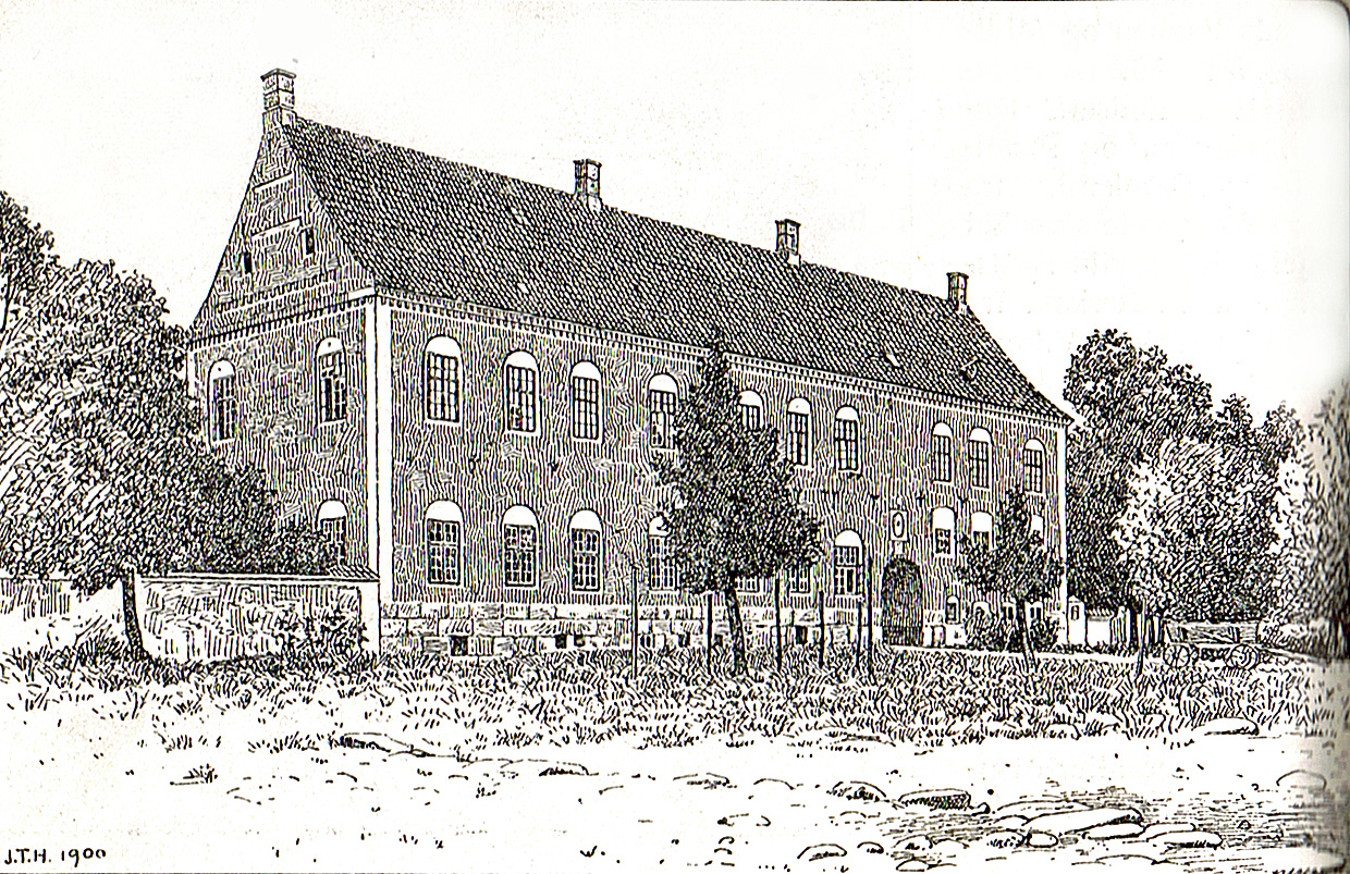 Trudsholm er en hovedgård i Kastbjerg Sogn i Gjerlev Herred nu Randers Kommune. Den kendt tilbage til 1381